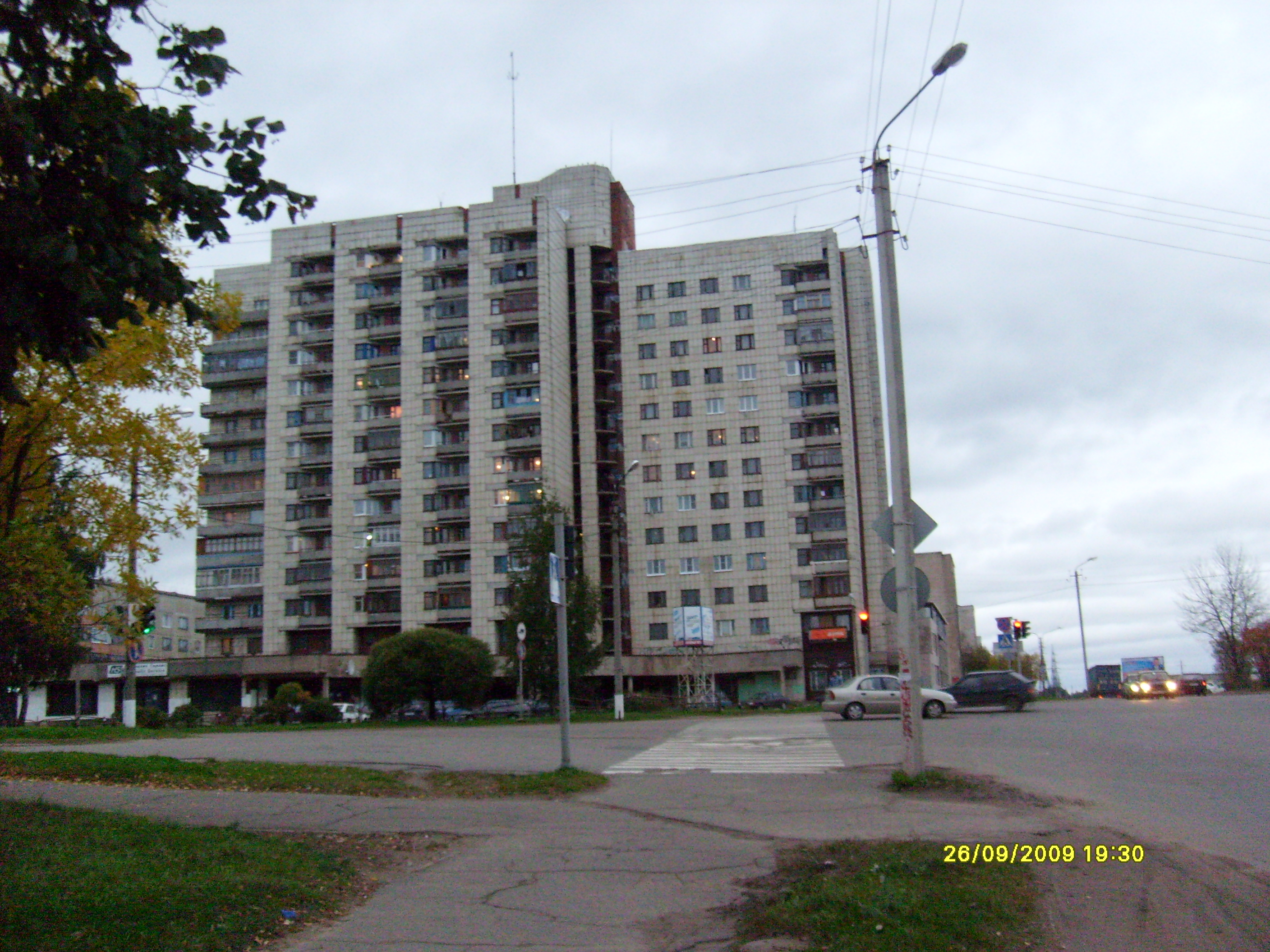 Тихвин,пересечении улиц Победы и Машиностроительной и Южной объездной дороги. Самый высокий жилой дом - 14 этажей.